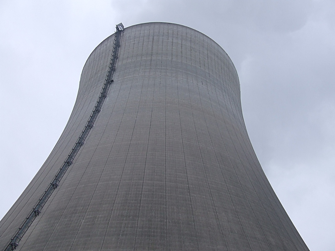 Kühlturm KKP 2